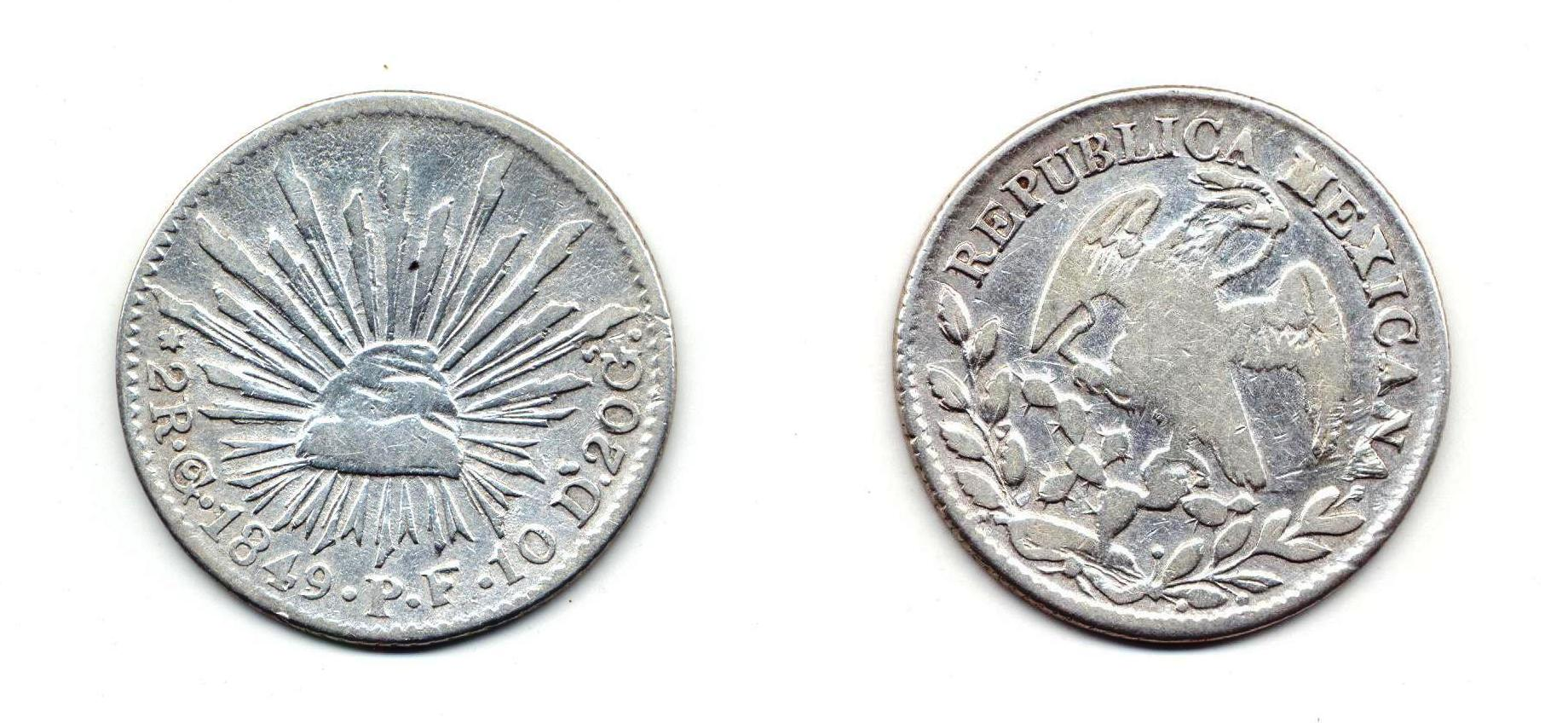 Moneda de 2 reales acuñada en la ceca de Guanajuato en 1849.